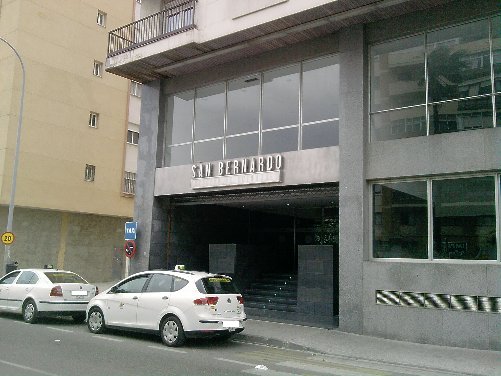 Entrada de la estación de autobuses San Bernardo, Algeciras.